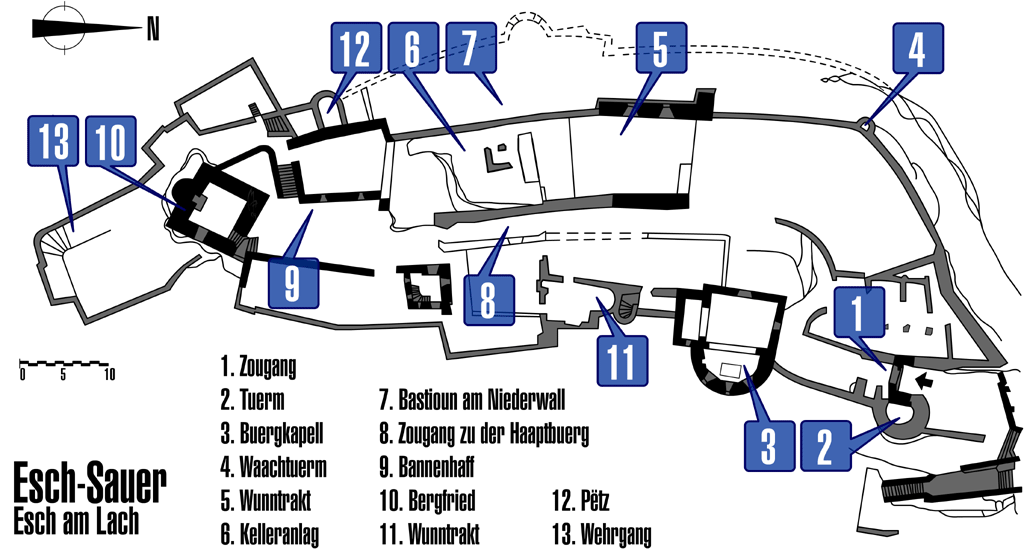 Plang vun der Buerg Esch-Sauer.